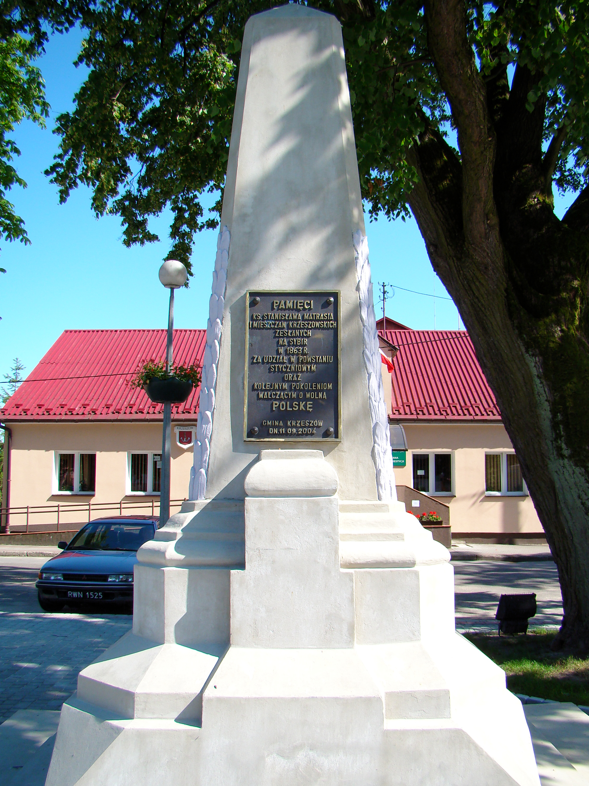 Krzeszów - pomnik przed UG